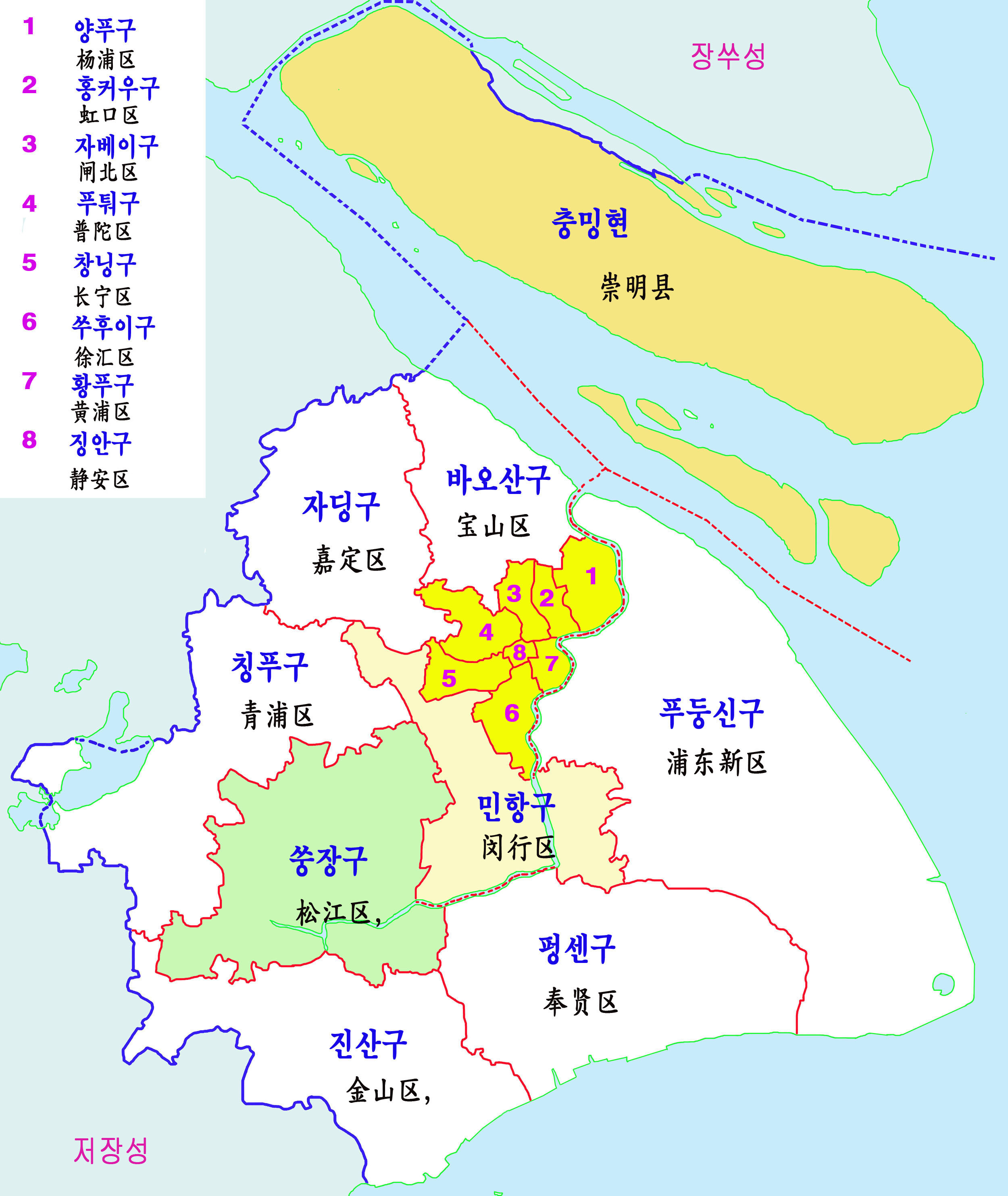 상하이시 행정구역